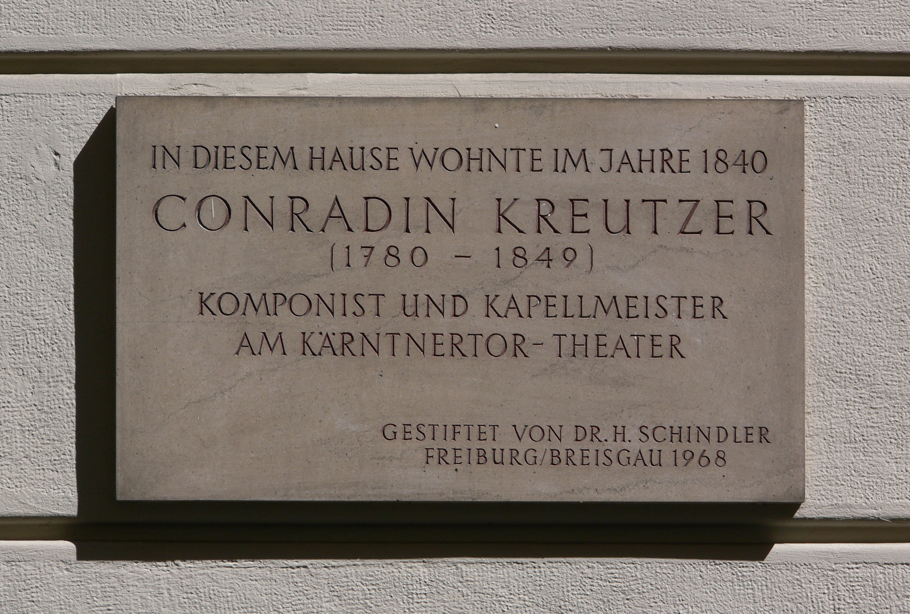 Tafel zum Gedenken an Conradin Kreutzer am Palais Starhemberg an der Dorotheergasse, Dorotheergasse 9, 1. Bezirk, Wien